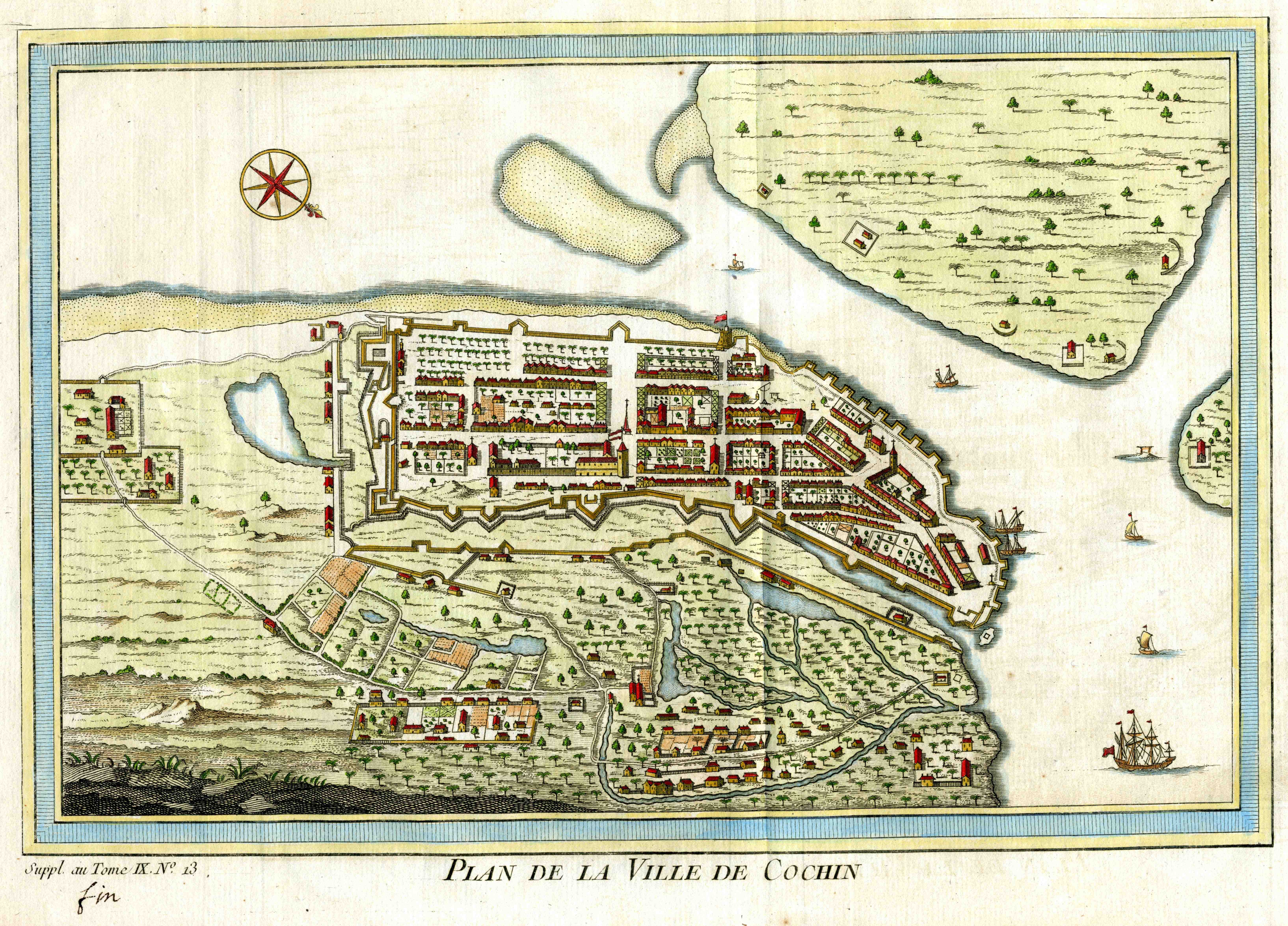 plan de la ville de Cochin en Inde, gravure en couleurs tirée de l'Histoire générale des Voyages